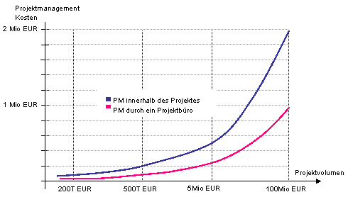 Abb. Kostenreduzierung Projektmanagementkosten pro Projekt